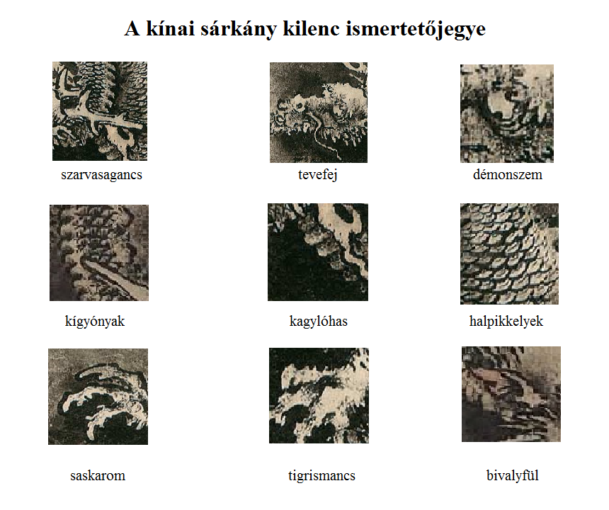 A kínai sárkány kilenc ismertetőjegye (jiusi 九似) Chen Rong (陳容) "A kilenc sárkány képe" (Jiu long tu 九龍圖) című tusfestményének (1244) részletei alapján